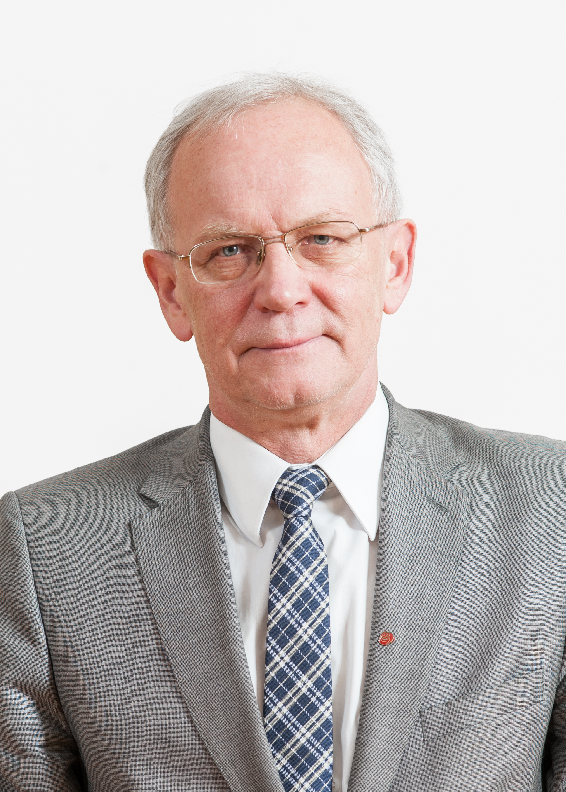 Eiki Nestor